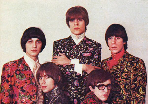 Los Gatos